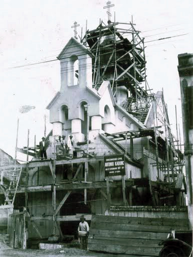 Строительство Свято-Никольского храма в Сан-Пауло